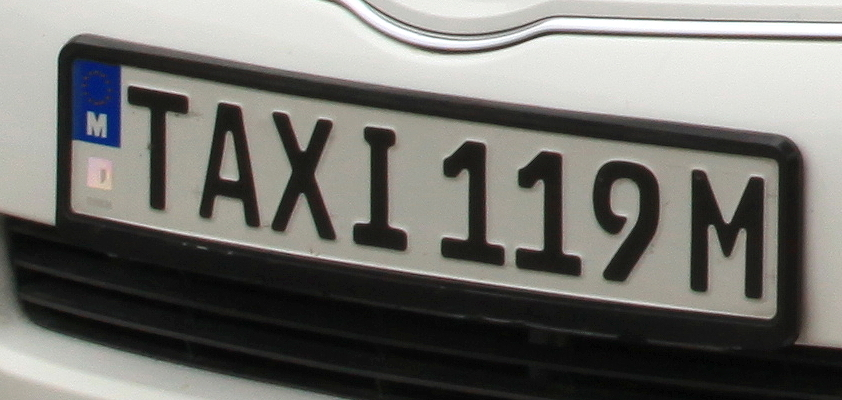 Maltese taxicab plate